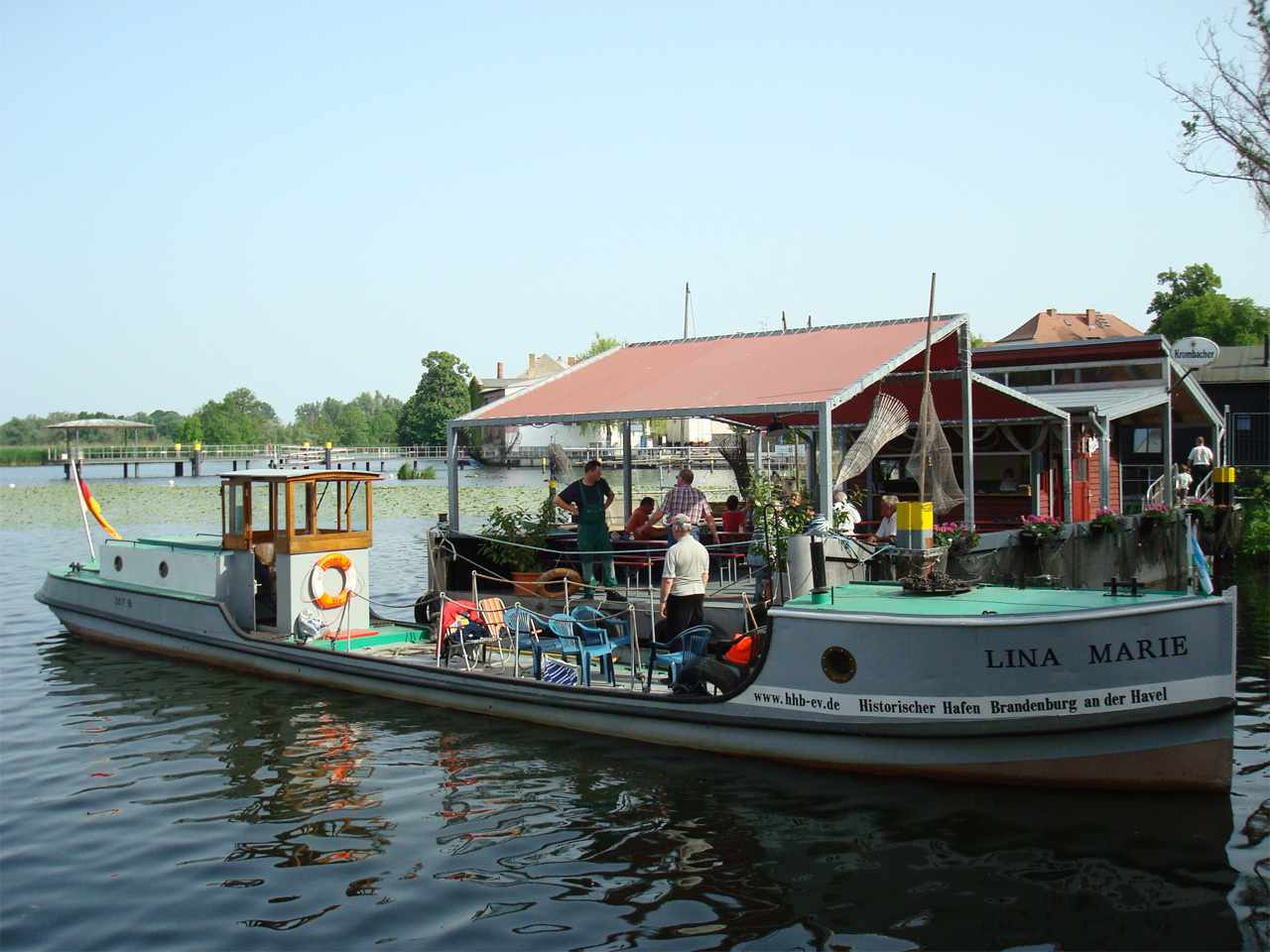 Schiffsansicht Fischtransporter LINA MARIE